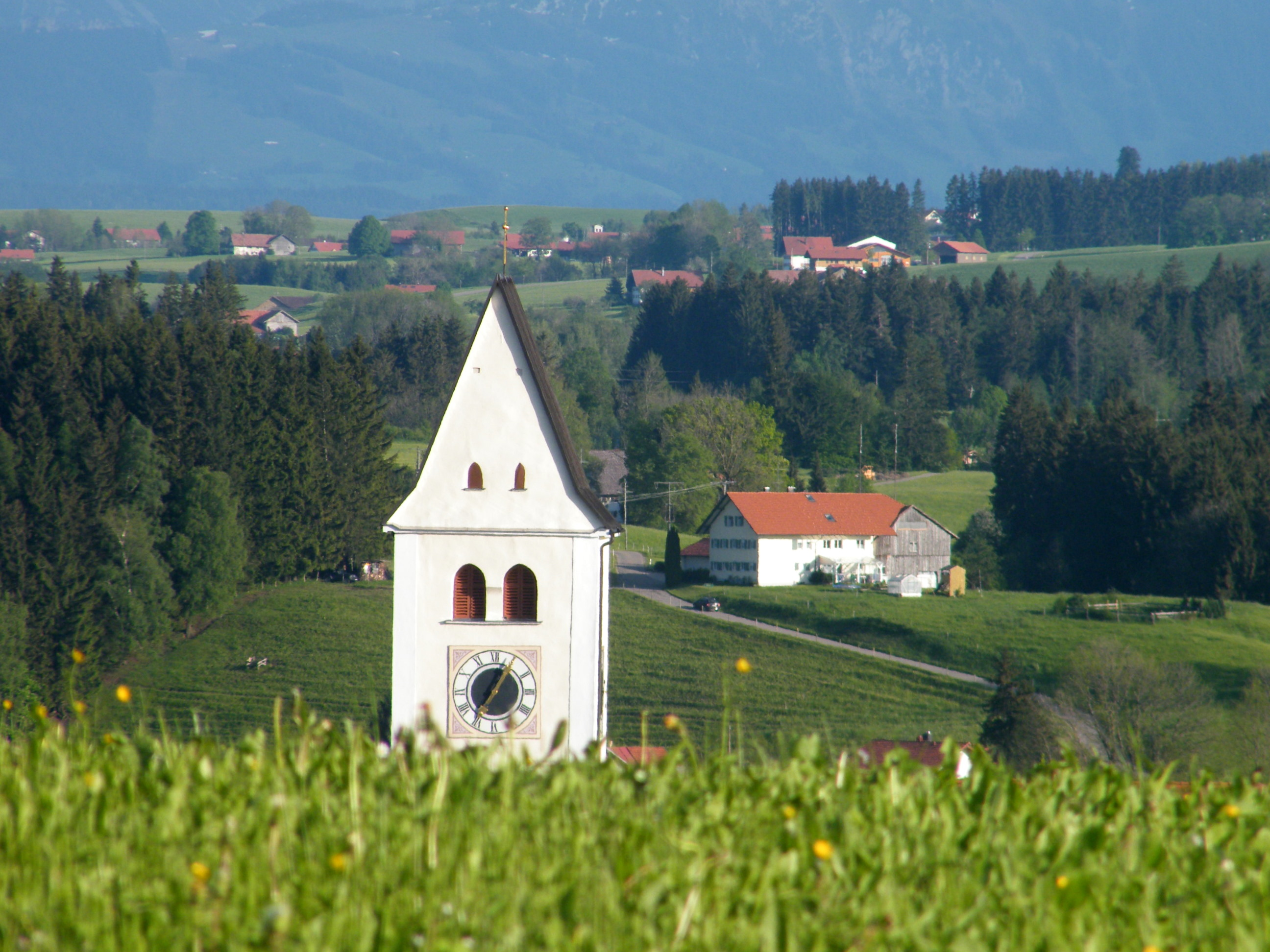 St.Blasius